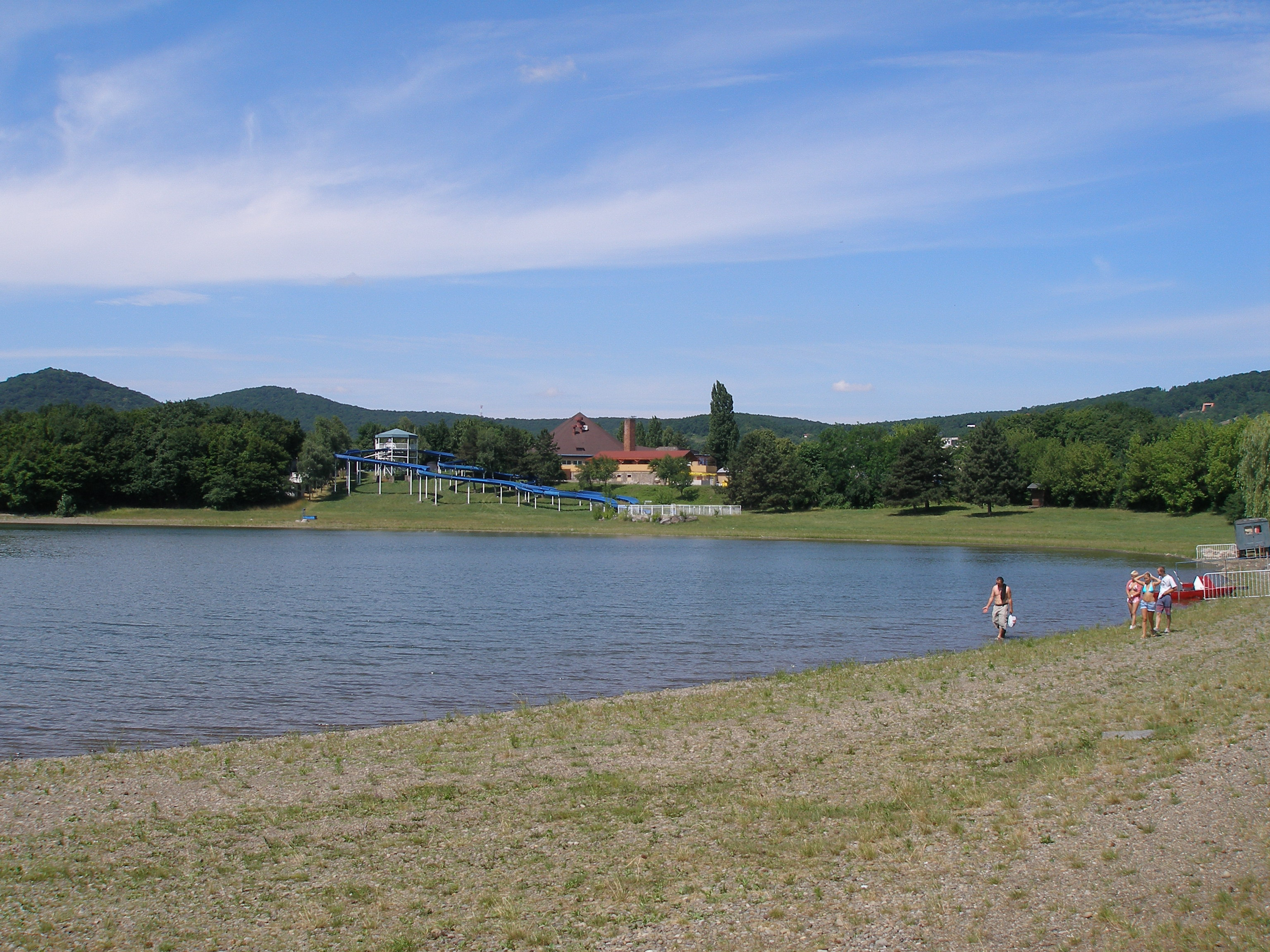 Zemplínska Šírava, rekreačné stredisko, región Zemplín, okres Michalovce